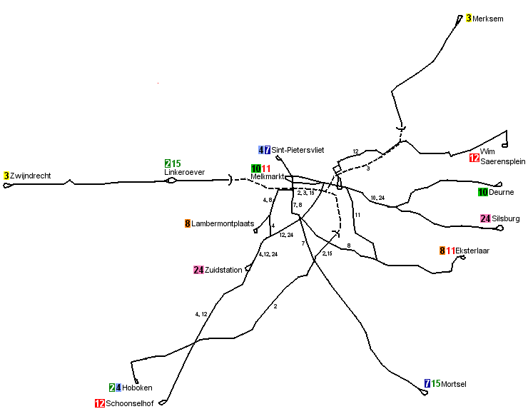 Réseau du tramway d'Anvers tel qu'il est entre 2002 et 2006.